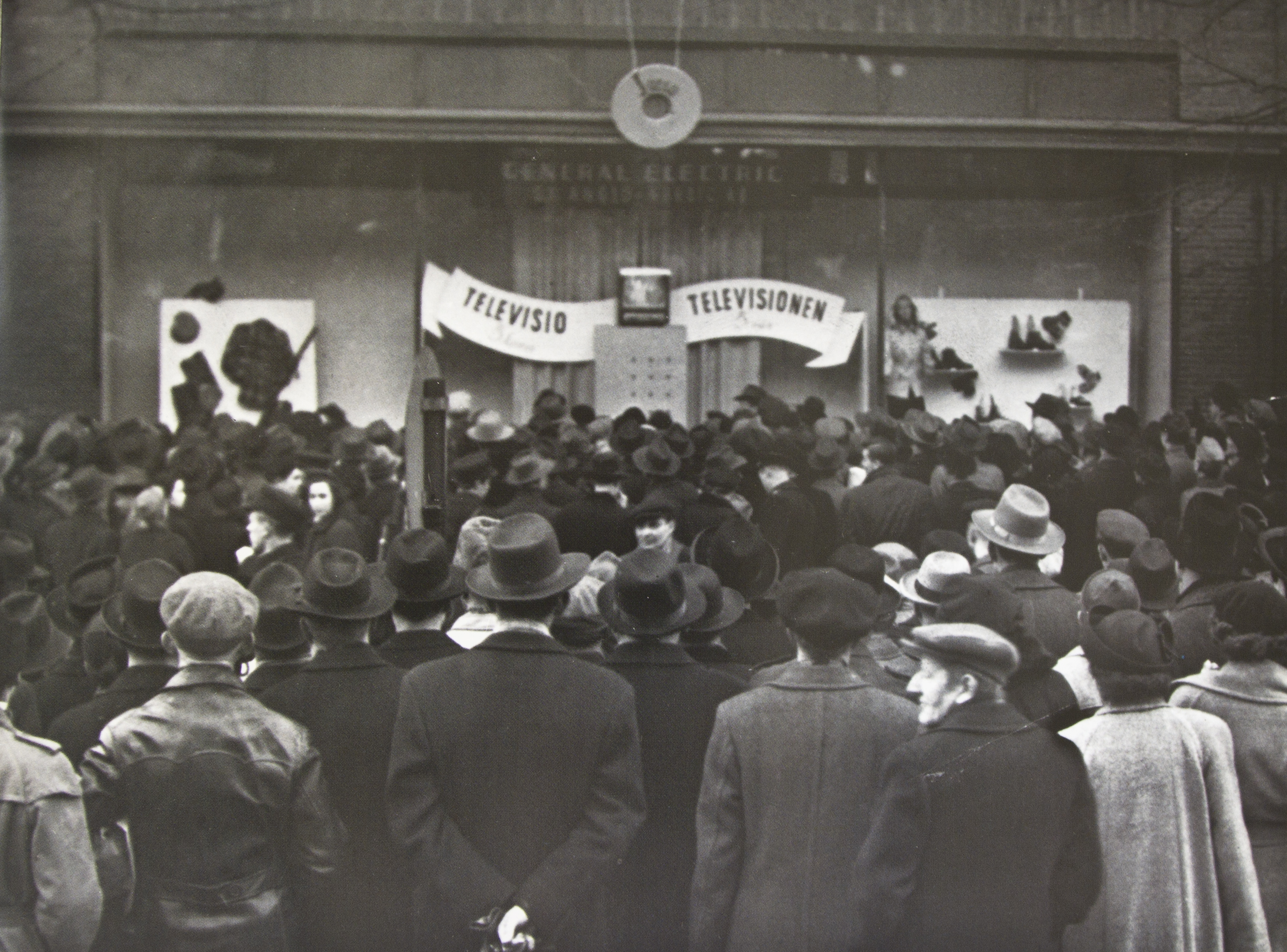 Televisio on tullut Suomeen. Koenäytös Stockmannin tavaratalon näyteikkunassa Helsingissä syksyllä 1950.